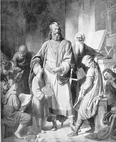 detail